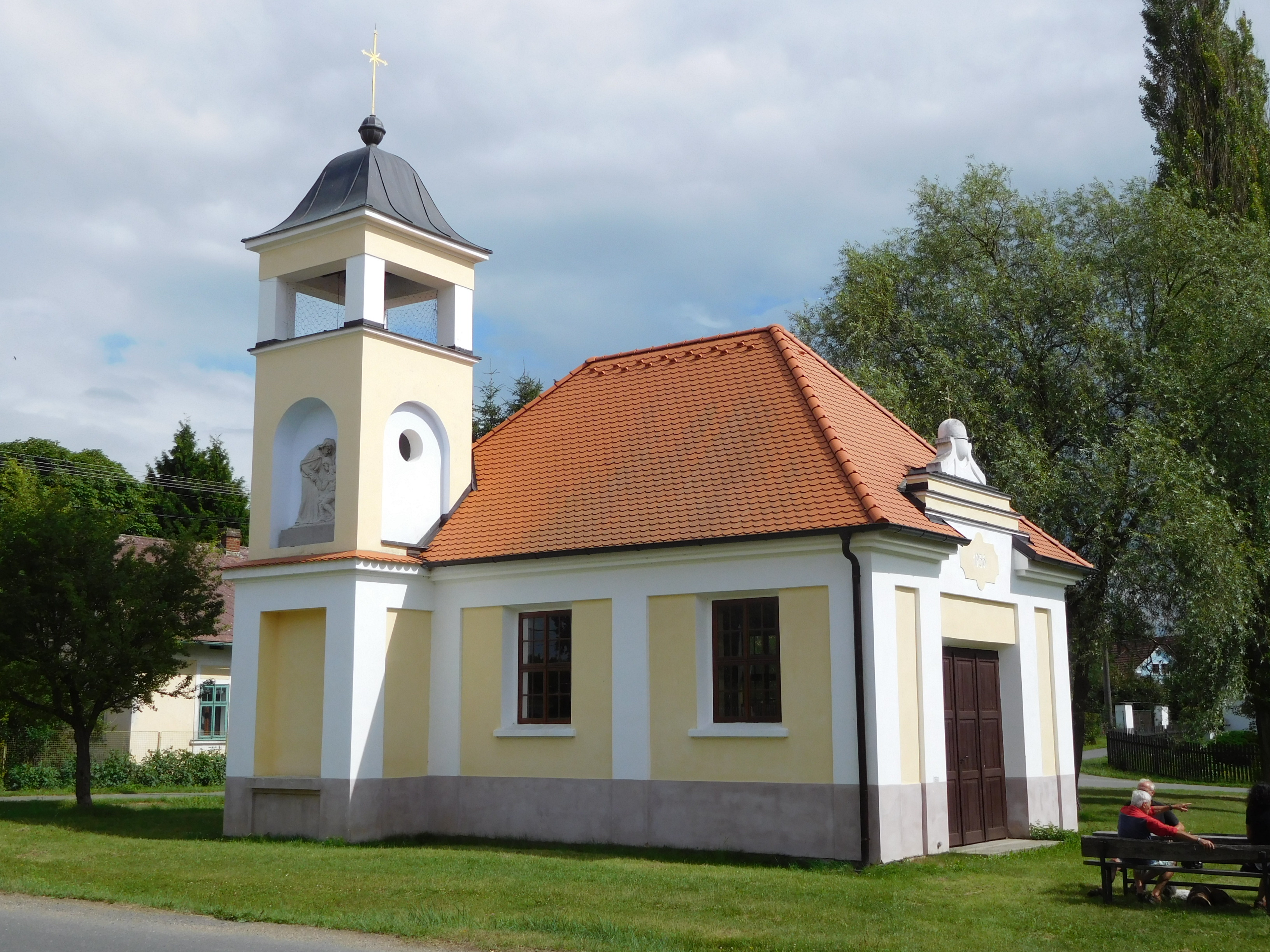 Čerňovice - Kaple Nejsvětější Trojice